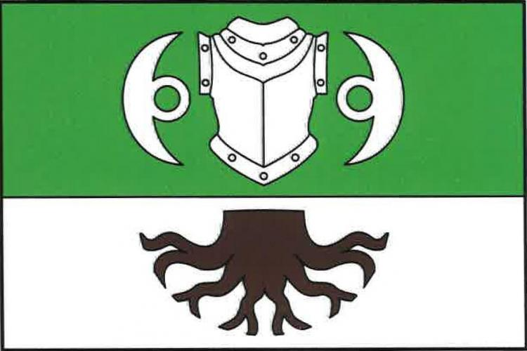 vlajka, Brnířov, okres Domažlice